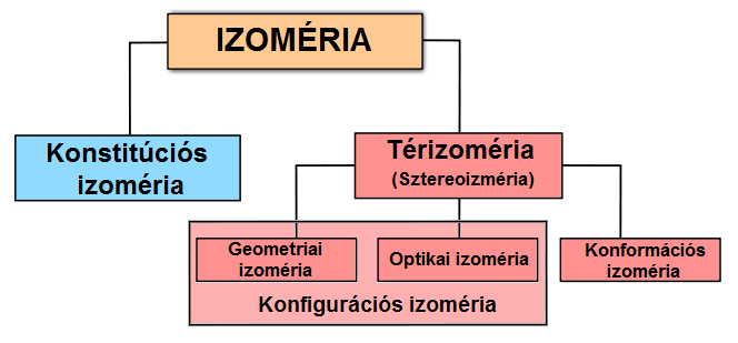 A short summary of the types of the isomerism in Hungarian